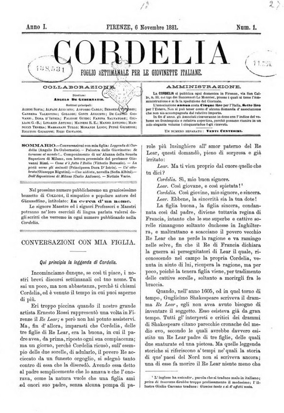 Prima pagina del periodico Cordelia, diretto da Angelo de Gubernatis, 1881